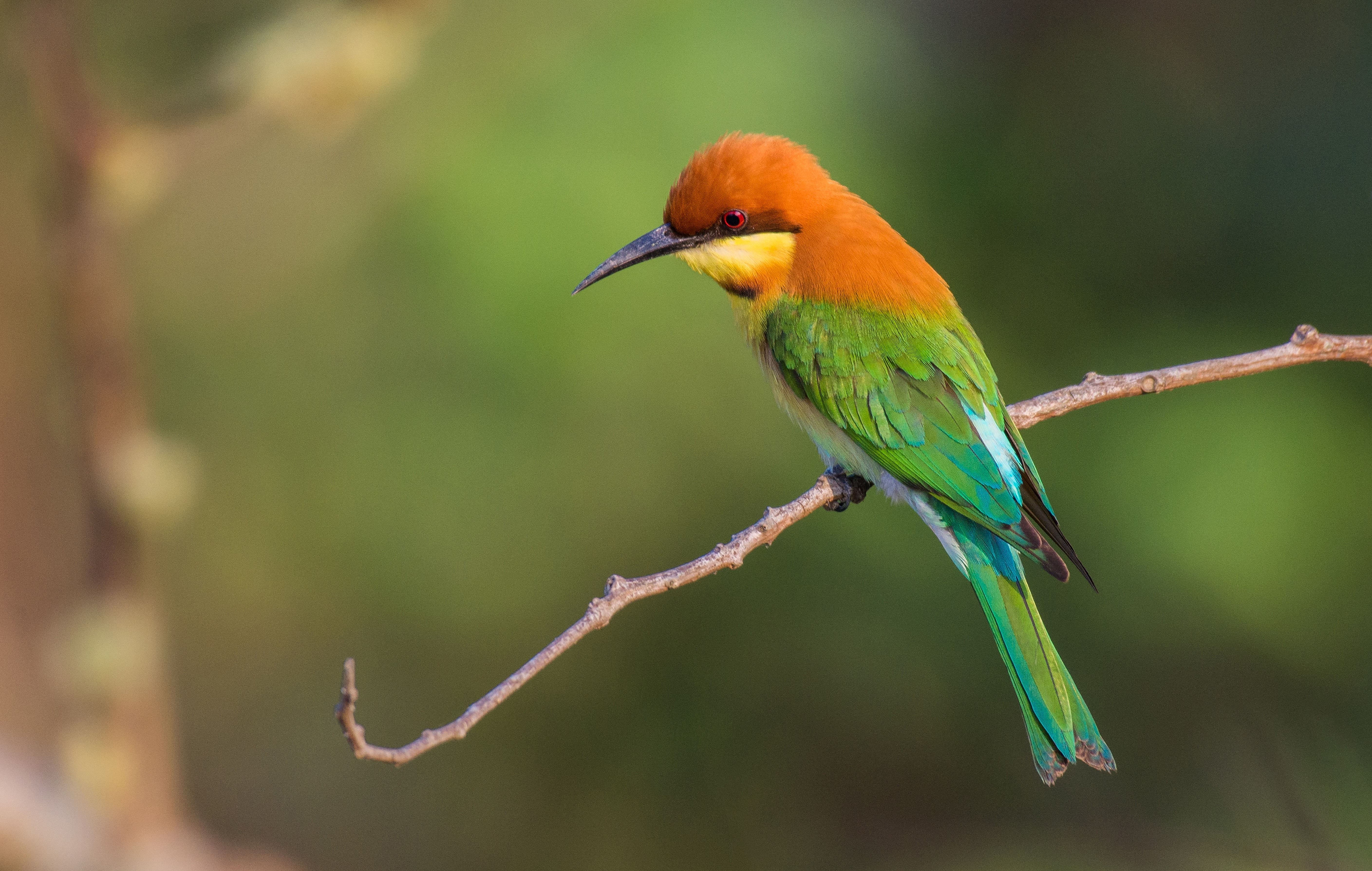 সাতছড়ি জাতীয় উদ্যান